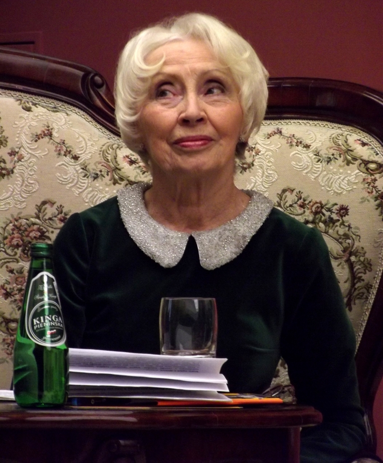 Anna Polony. Zdjęcie zrobione podczas otwarcia wystawy "Szuflada Szymborskiej" w Muzeum Narodowym w krakowskich Sukiennicach. Woda "Kinga Pienińska".